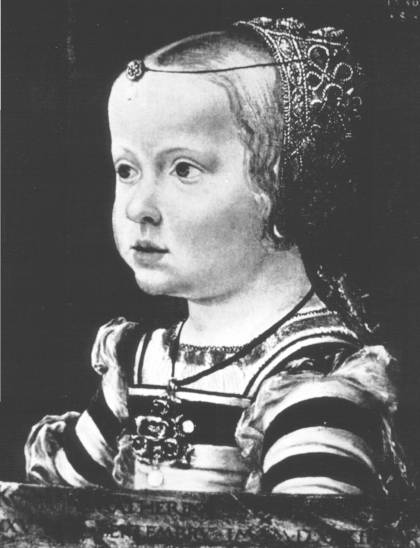 Katarzyna Austriaczka